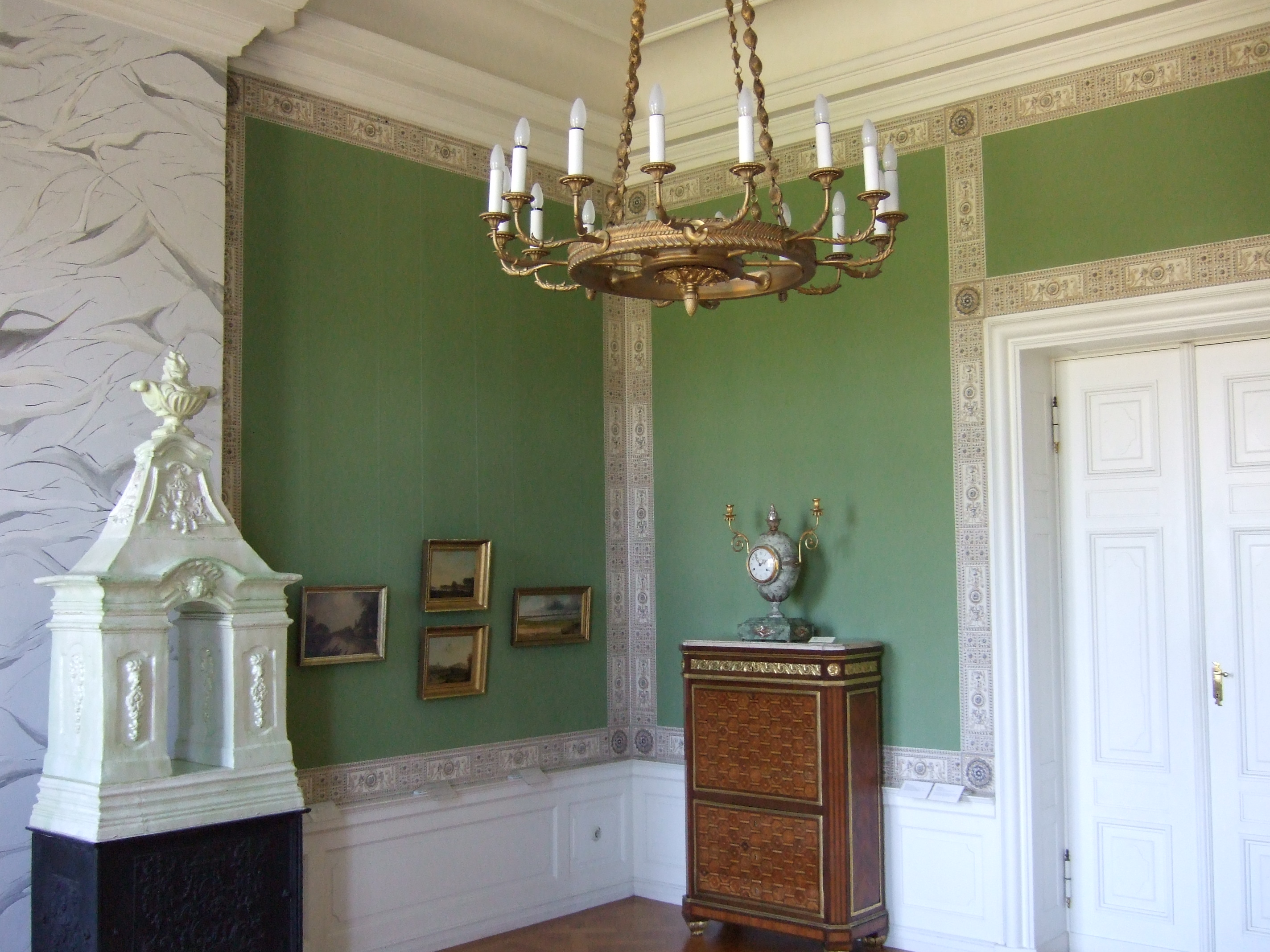 Schloss Friedrichsfelde, Zimmer 6